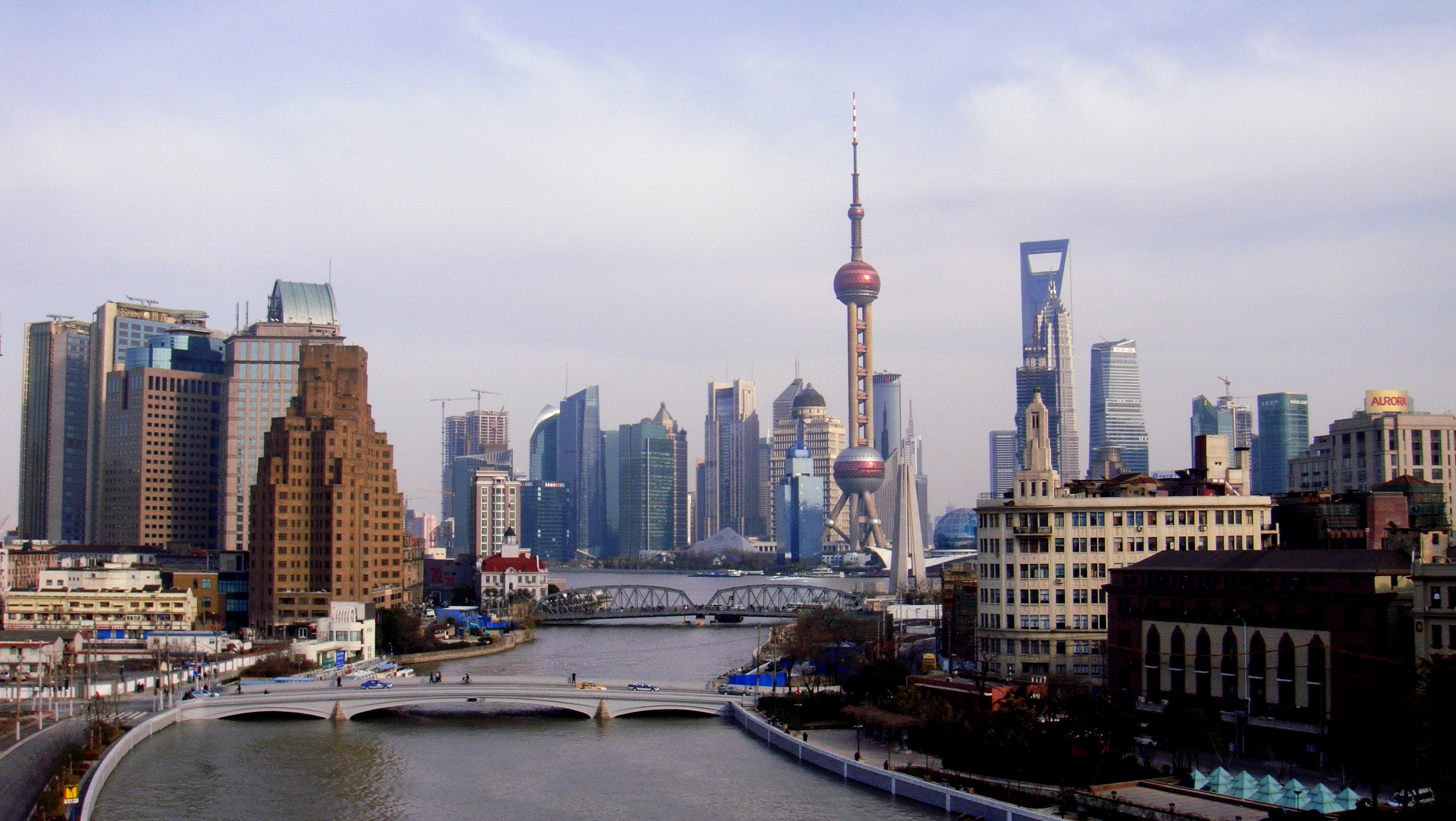 中文（中国大陆）: 从邮政总局大楼眺望苏州河口吴语: 从四川路邮政局朝苏州河特子黄浦江个地方拍个